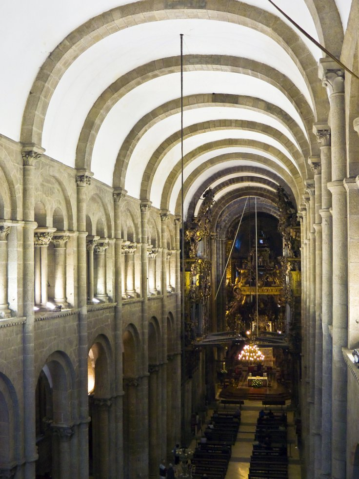 Catedral de Santiago de Compostela desde a Tribuna